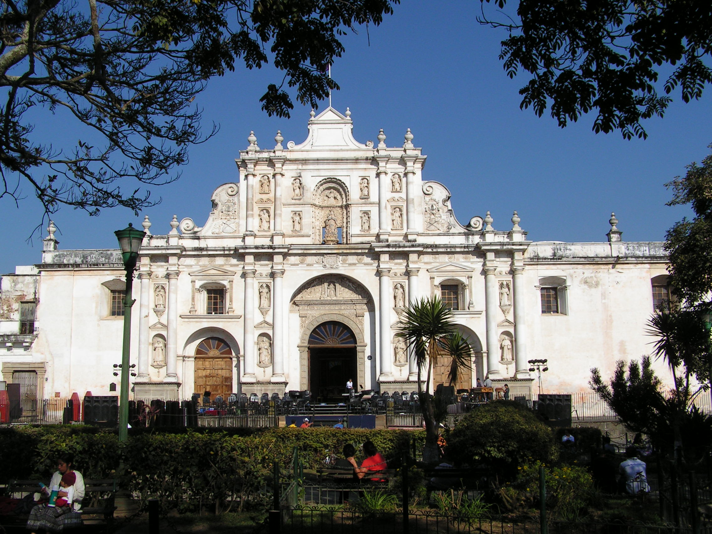 Kerk Antigua